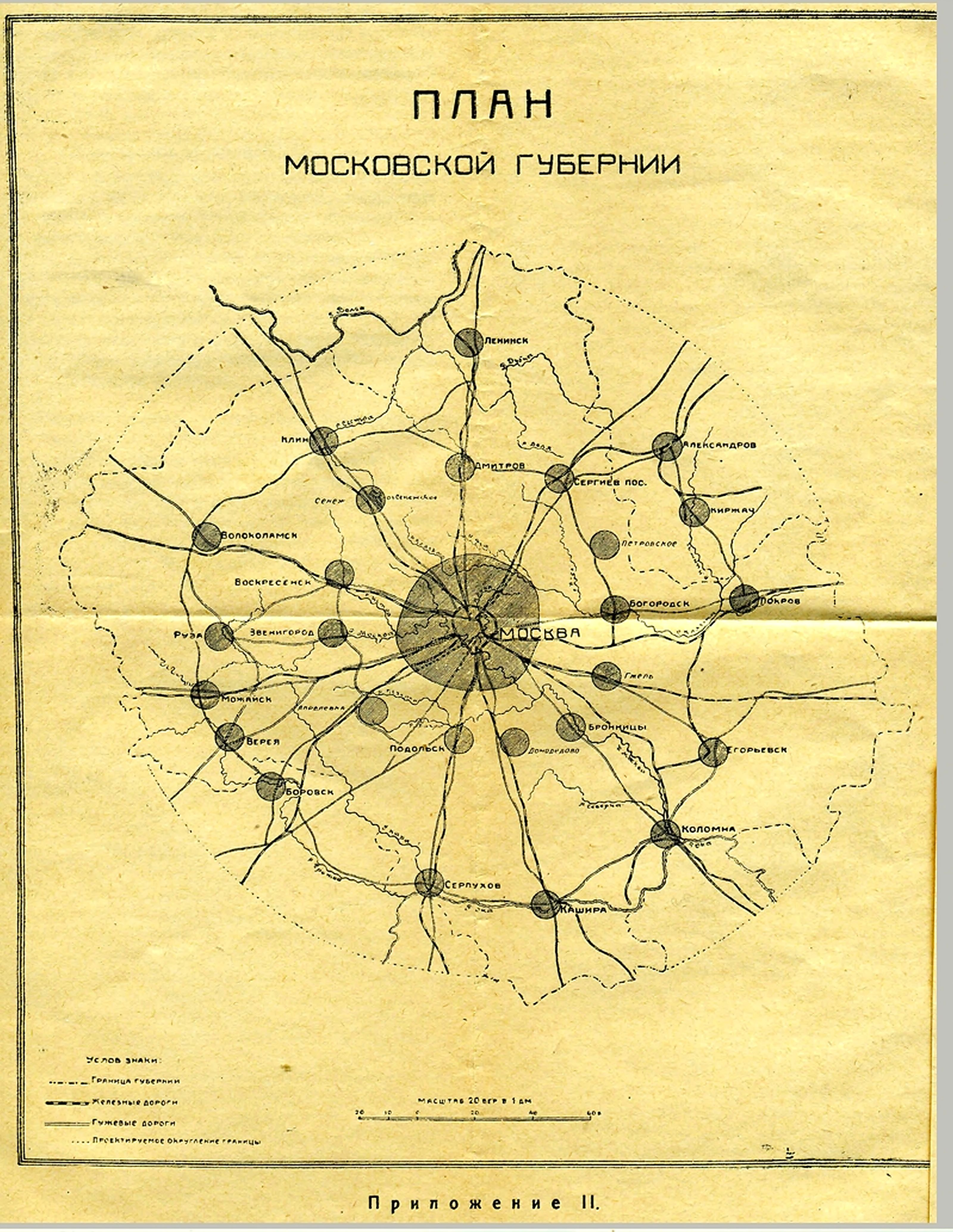 "План Московской губернии". Приложение II к книге С.С. Шестакова "Большая Москва"